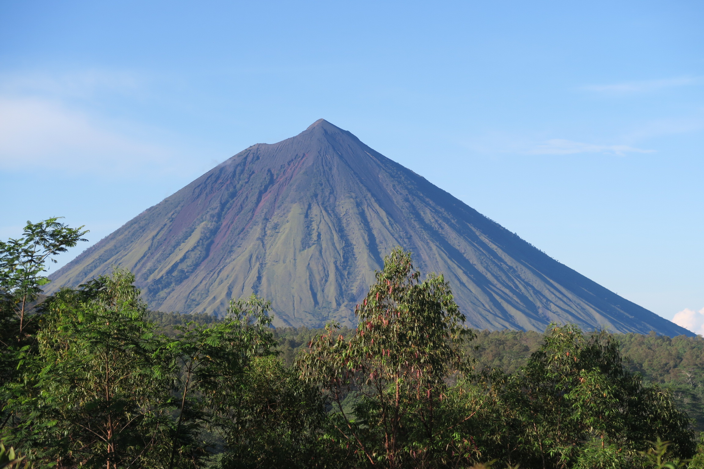 Inierie volcano in Flores, Indonesia.